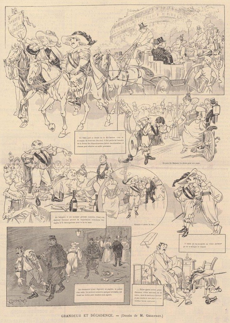 Serie de dessins sur la Mi-Carême à Paris.